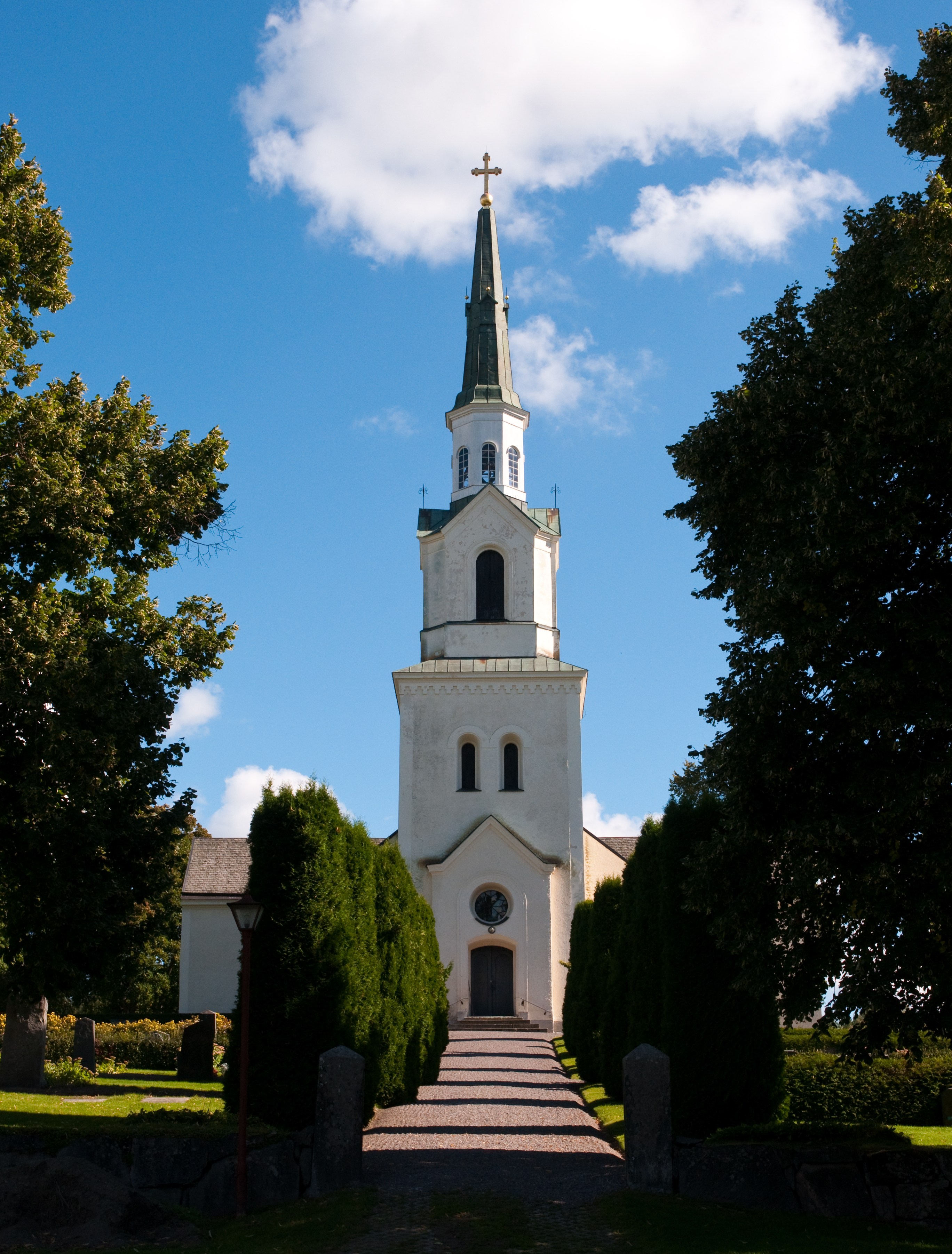 Östra Stenby kyrka i Östra Stenby församling i Linköpings stift och Norrköpings kommun.